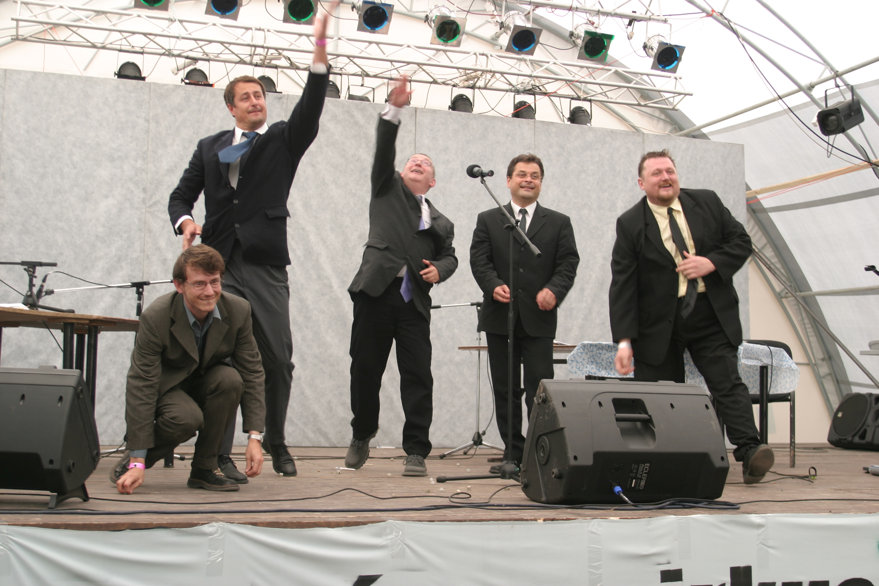 Literárny cirkus KKBagalu - Živý dôkaz 2004